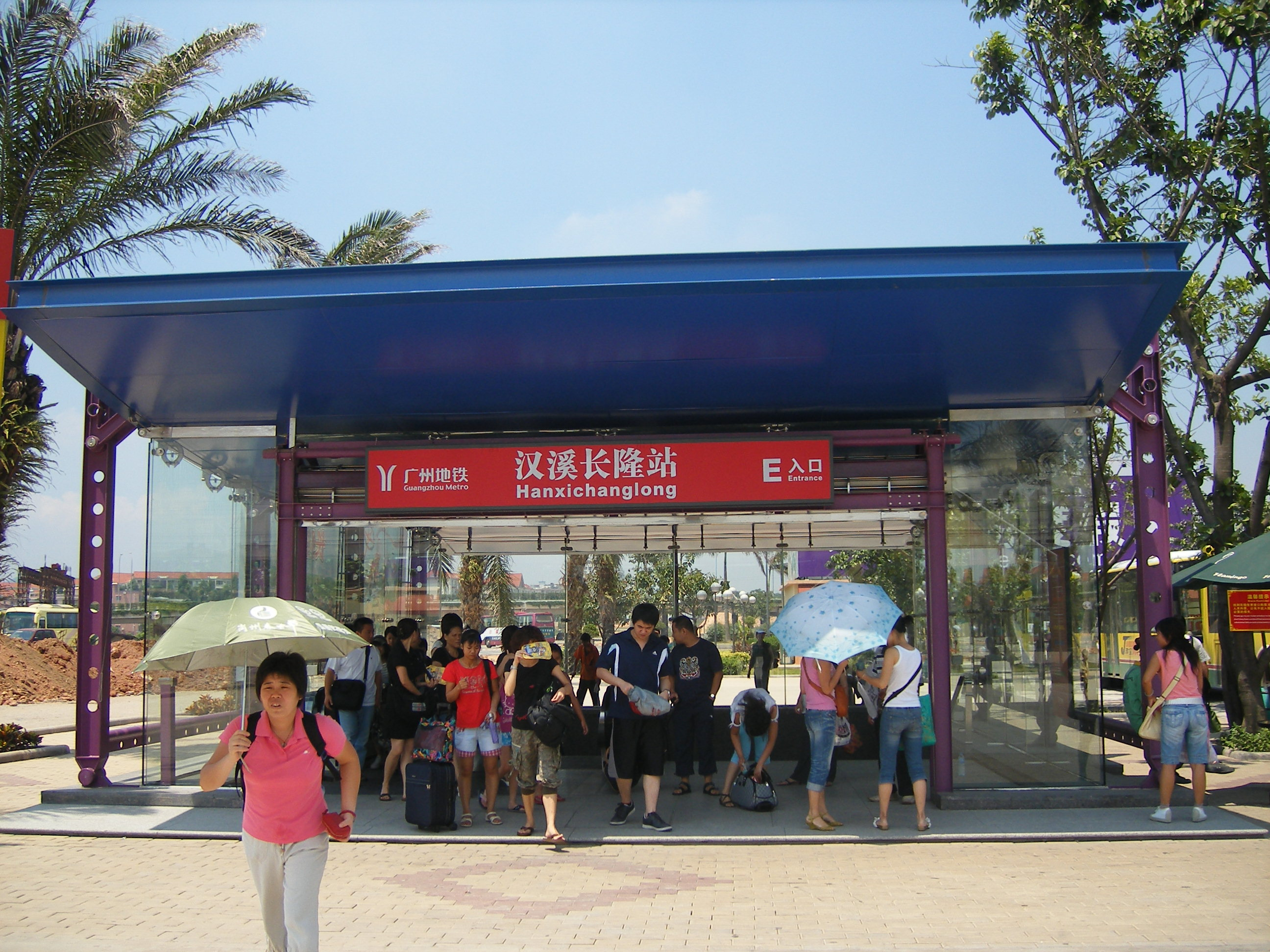 广州地铁三号线汉溪长隆站出入口。